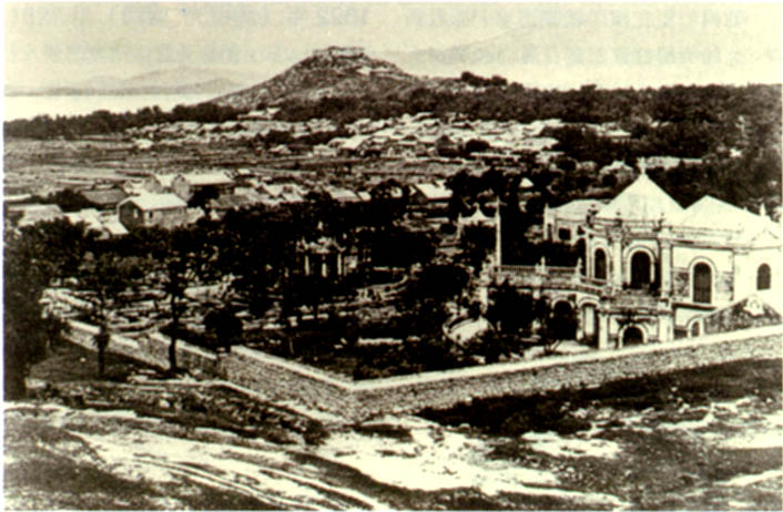 英國東印度公司澳門分公司